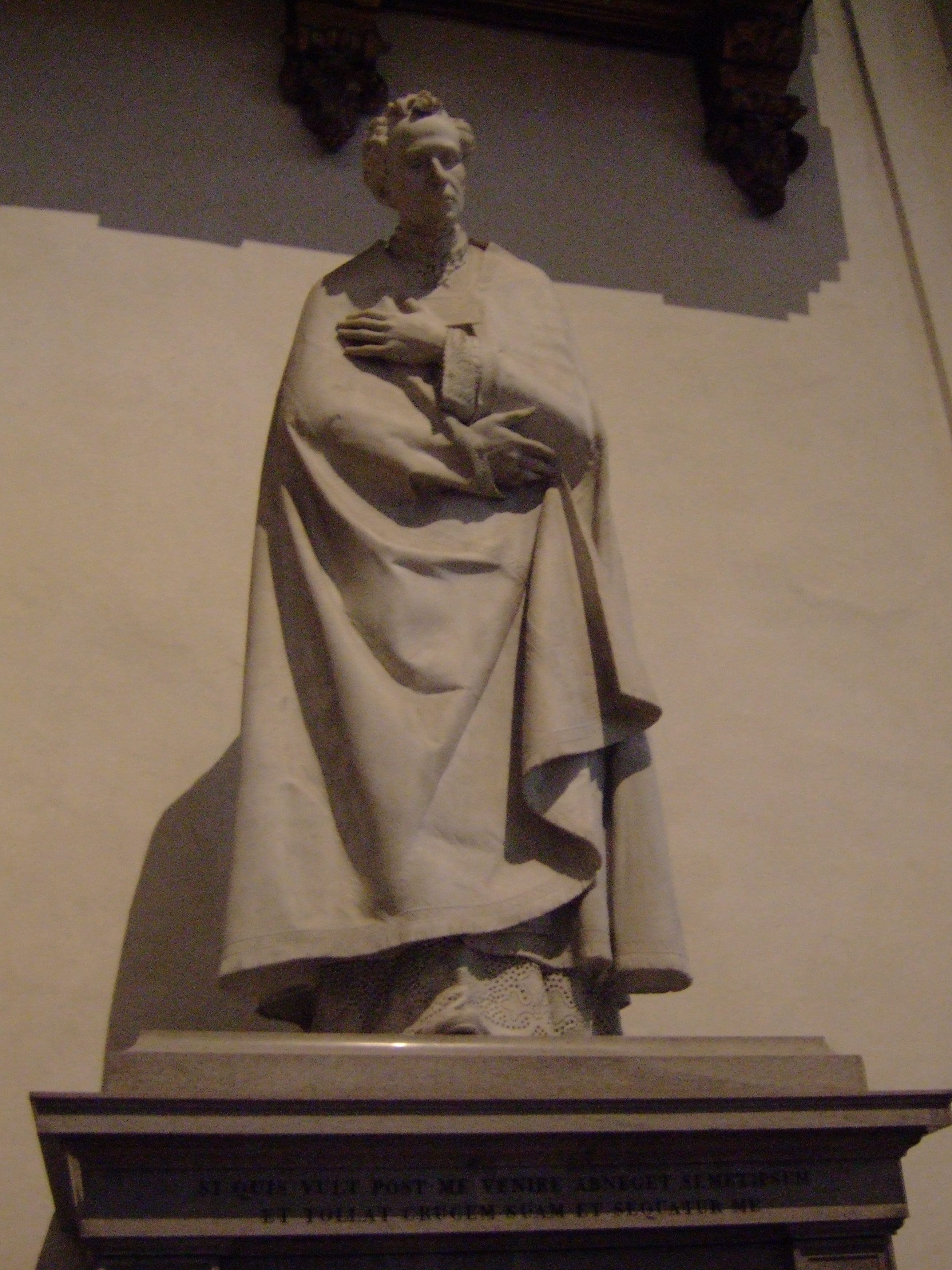 Duomo di Udine Statua del vescovo Zacaria Bricito